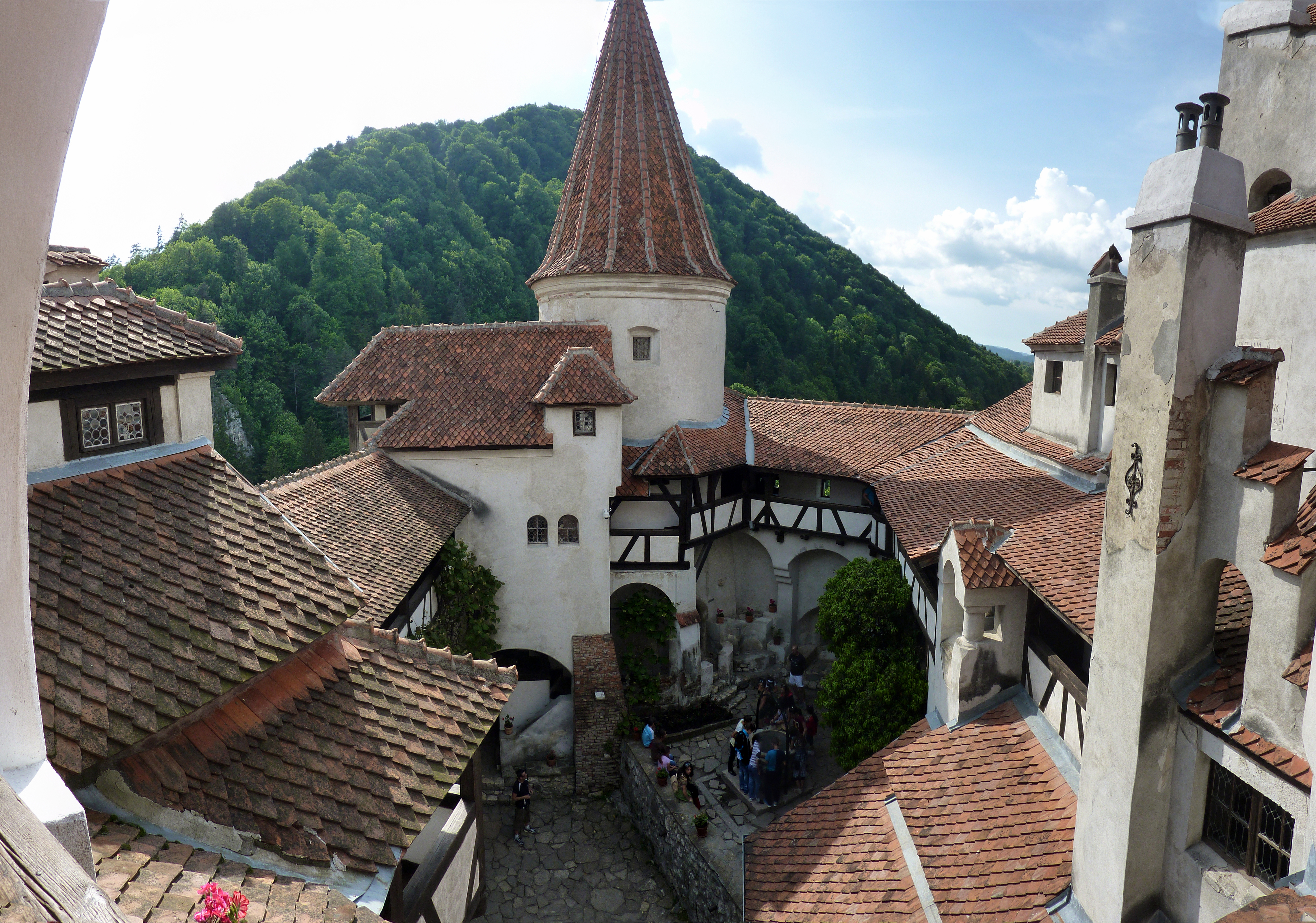 Dans le chateau de Bran